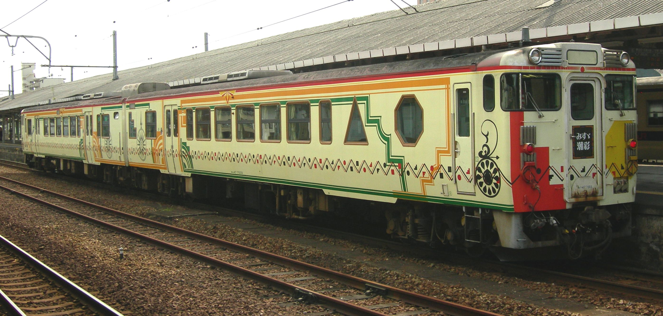 キハ47形 みすゞ潮彩